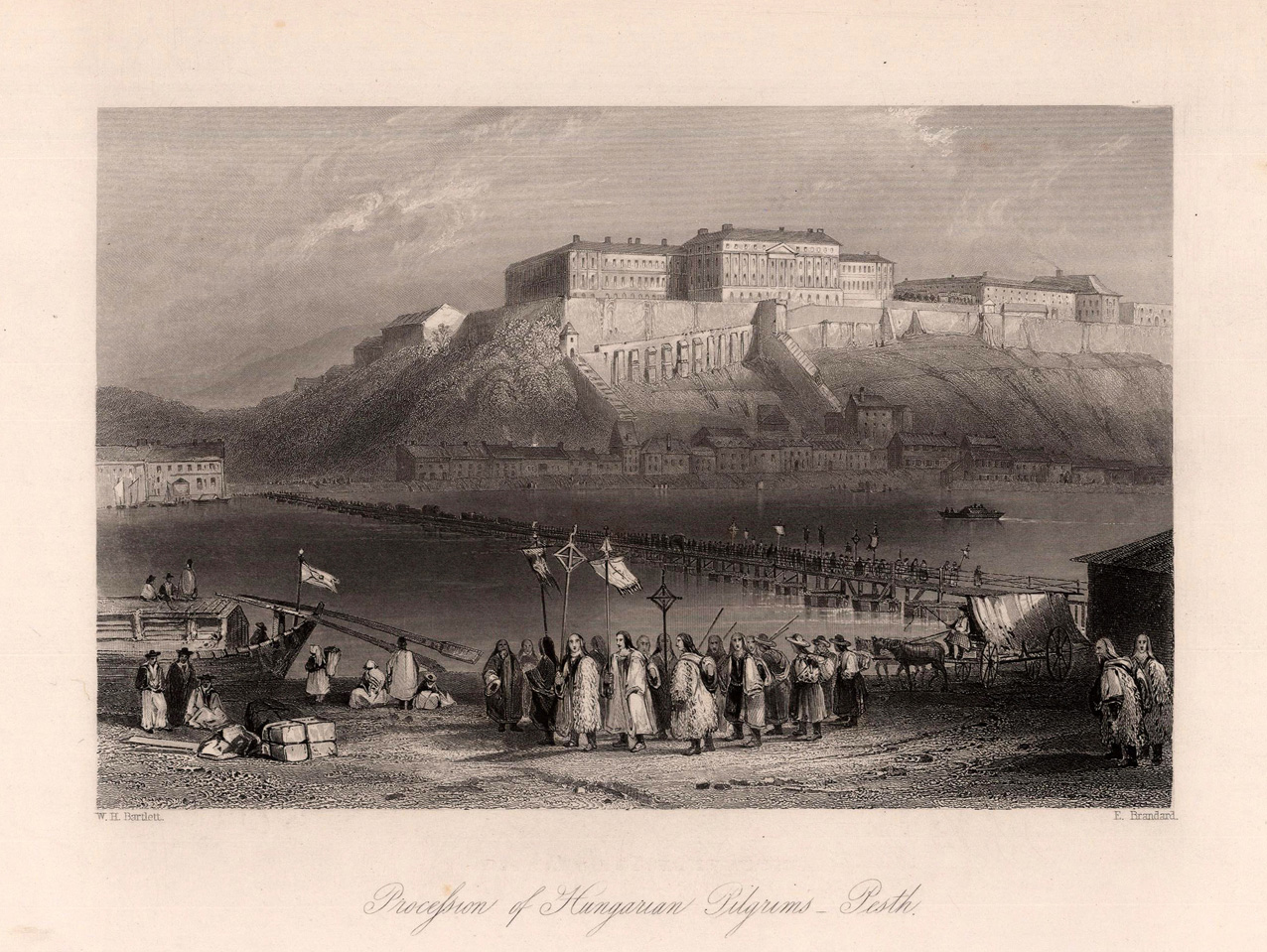 Körmenet a Hajóhíd pesti hídfőjénél 1844-ben